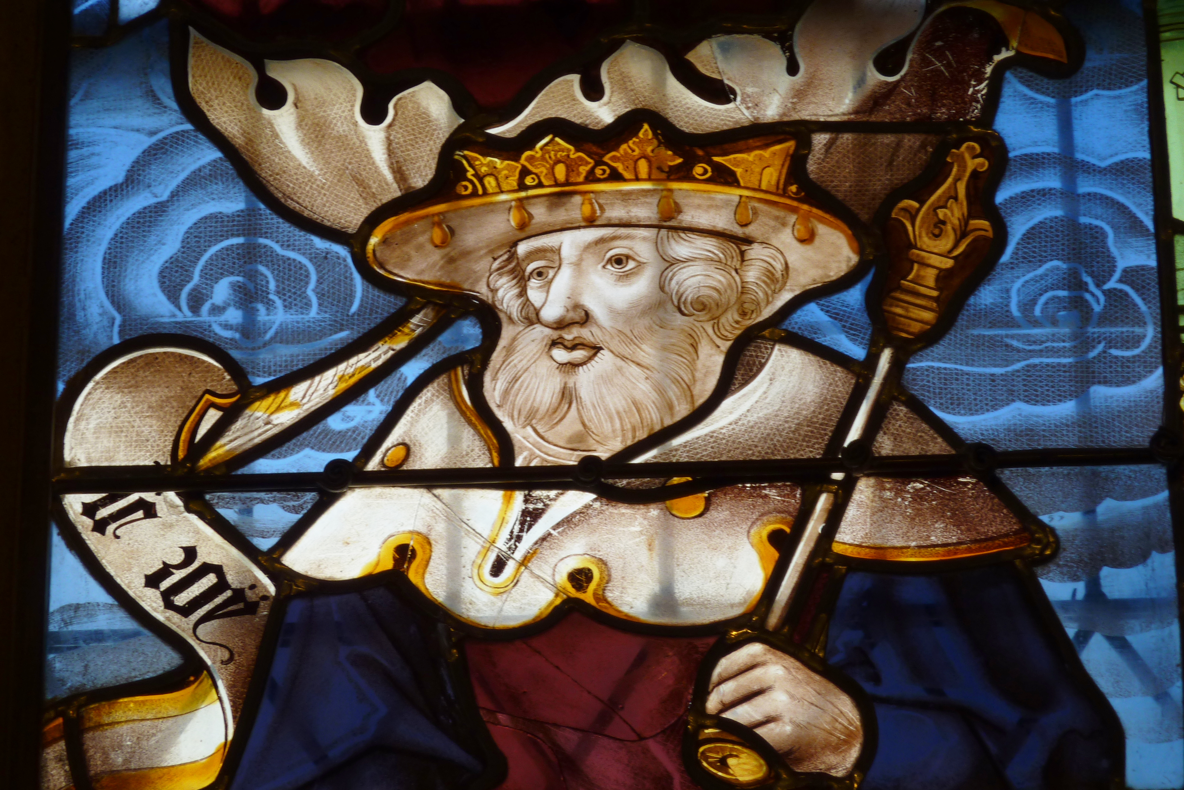 Palais Rihour in Lille im Département Nord (Nord-Pas-de-Calais/Frankreich), Bleiglasfenster Wurzel Jesse mit Fragmenten aus dem 16. Jahrhundert, Darstellung: König Josaphat (Ausschnitt unten Mitte)